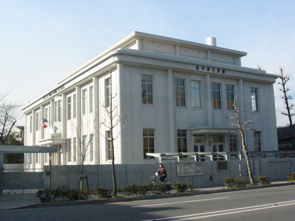 関西日仏学館（1936年、京都市左京区、設計：R.メストラレ、木子七郎）